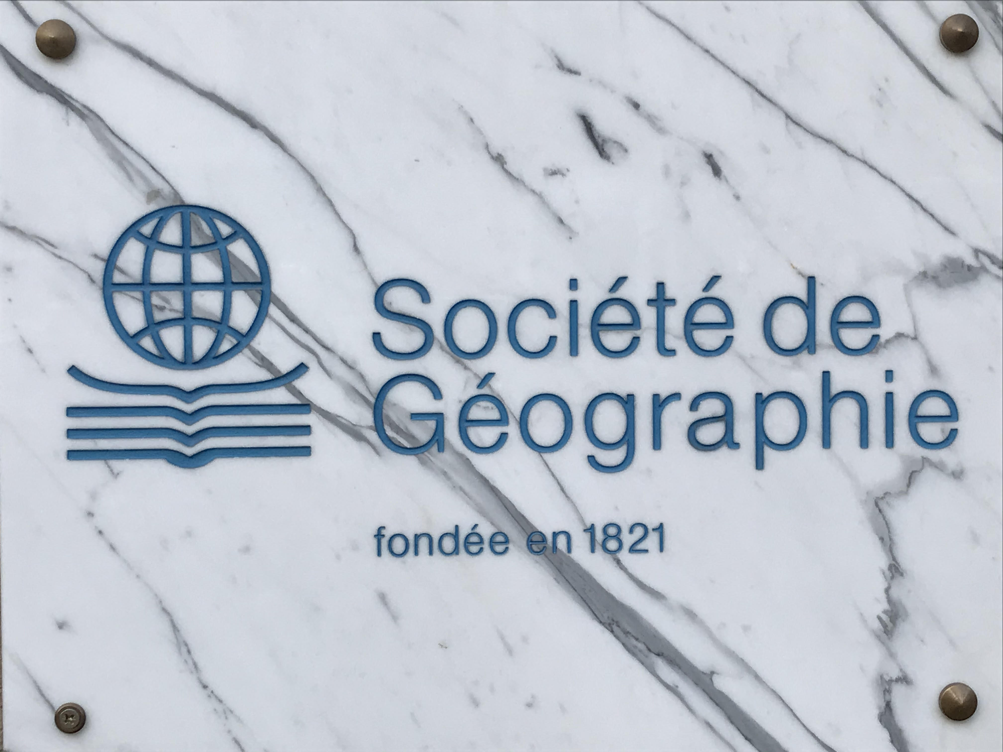 Plaque en marbre Société de Géographie avec logo